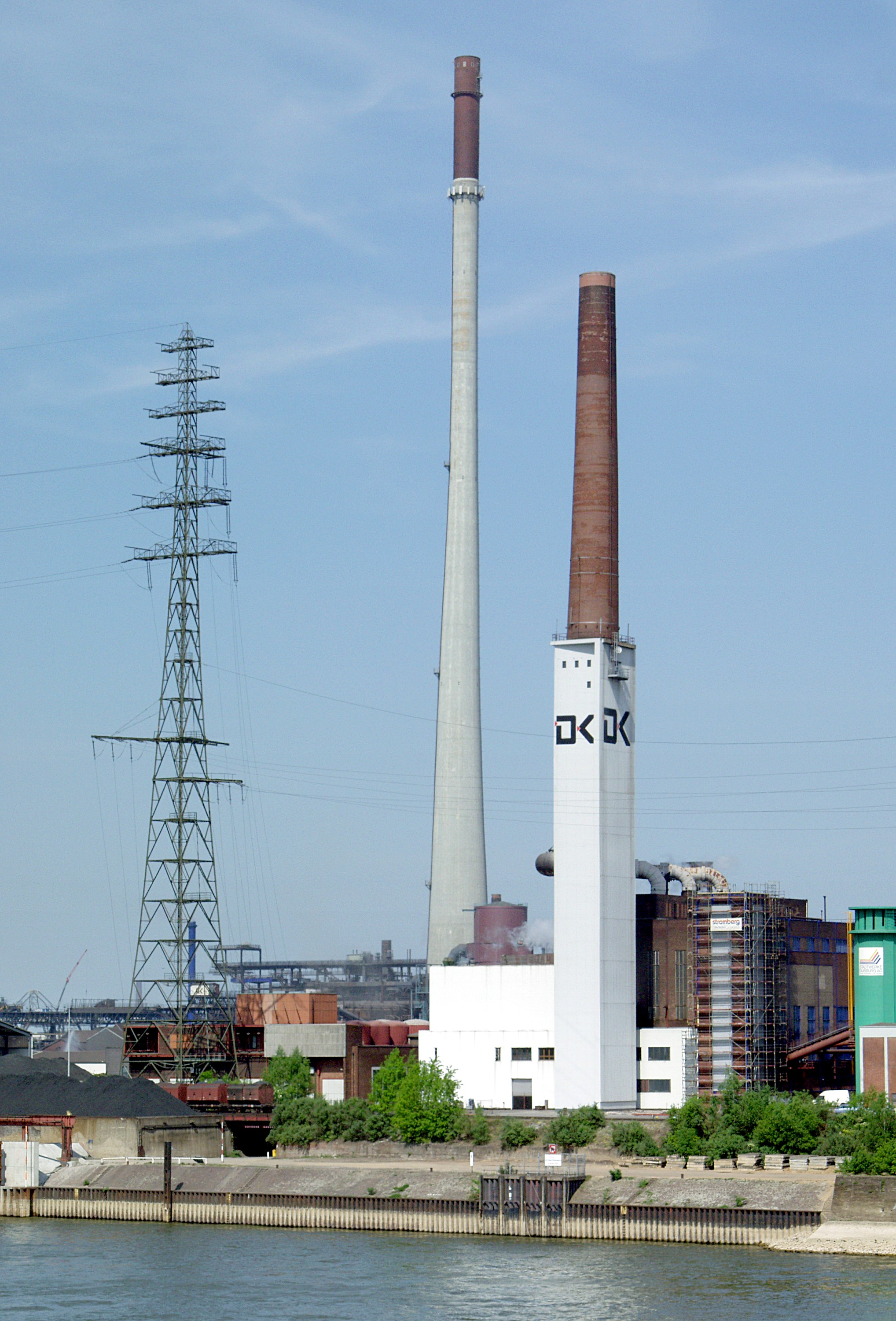 Rechtes Rheinufer Duisburg-Hochfeld. Links: Mast der Freileitungskreuzung (110 kV, Bl. 2303) über den Rhein, Mitte: Schornstein der Sinteranlage der DK Recycling GmbH. Höhe: 250 m